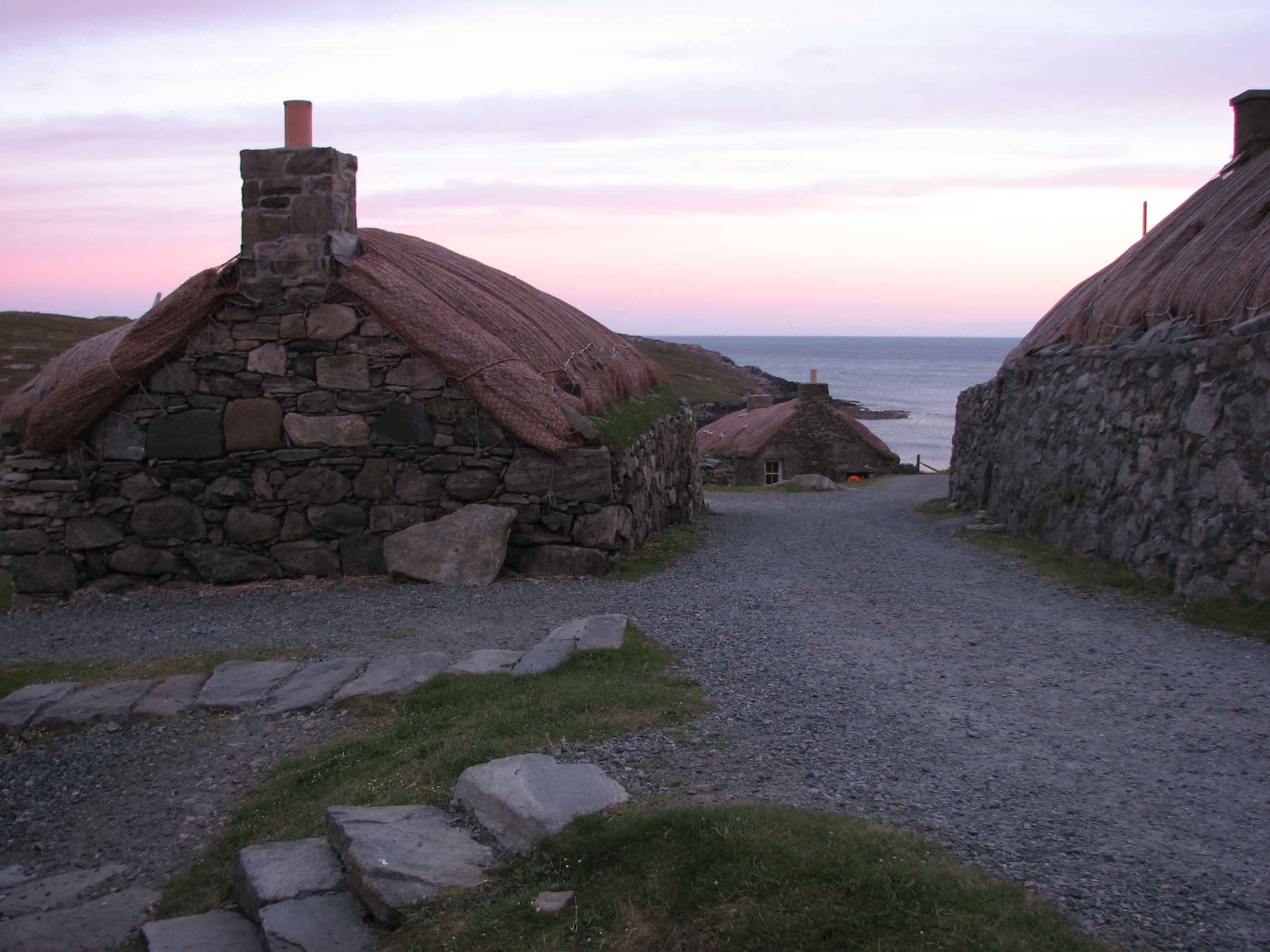 Isle of Lewis, Garenin Youth Hostel, Anglia